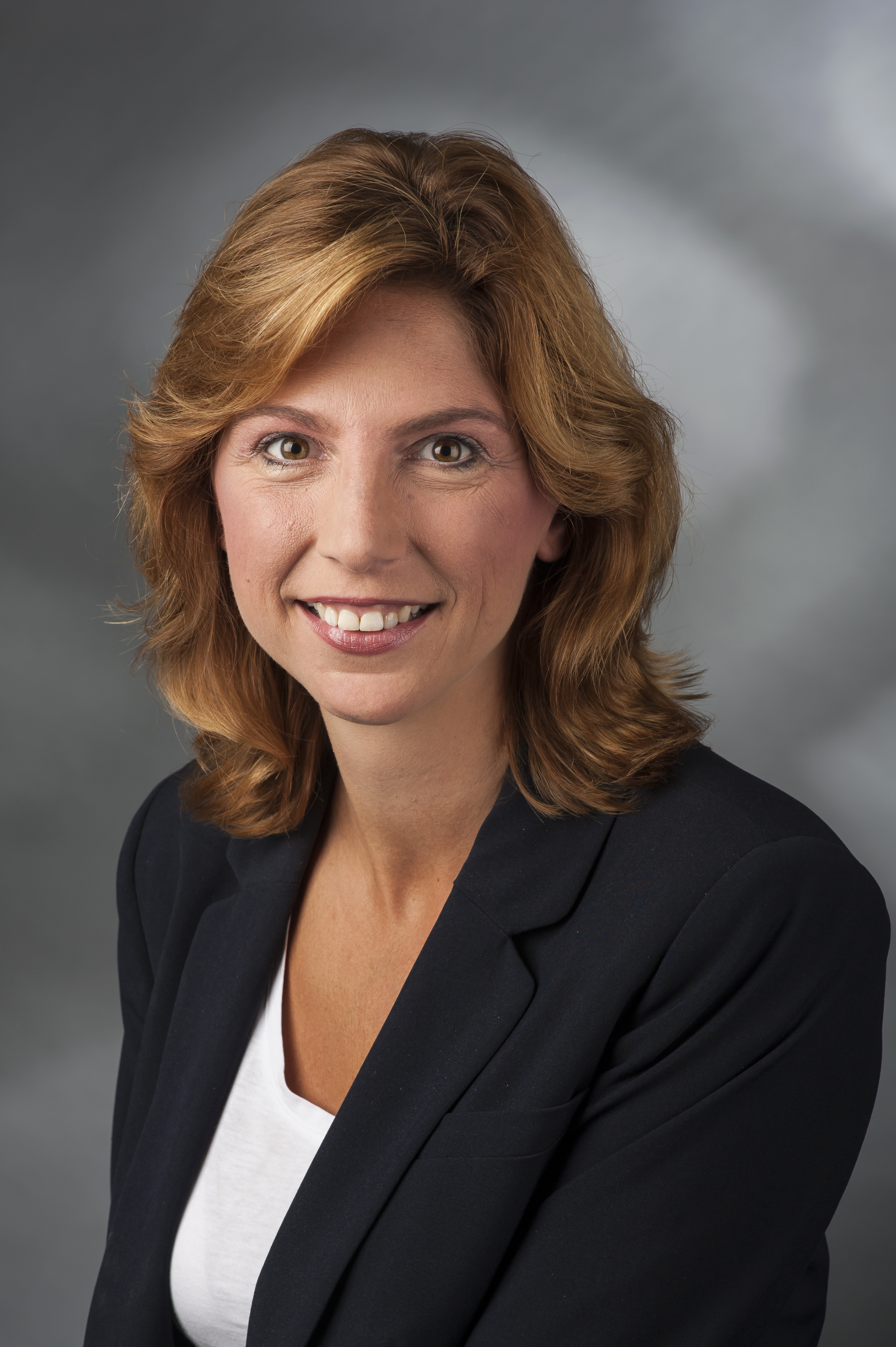 Sabine Bätzing-Lichtenthäler (* 13. Februar 1975 in Altenkirchen (Westerwald)) ist eine deutsche Politikerin (SPD). Sie ist seit 2002 Mitglied des Deutschen Bundestages und war von 2005 bis 2009 Drogenbeauftragte der Bundesregierung.